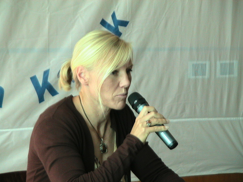 Immagine della canoista Josefa Idem